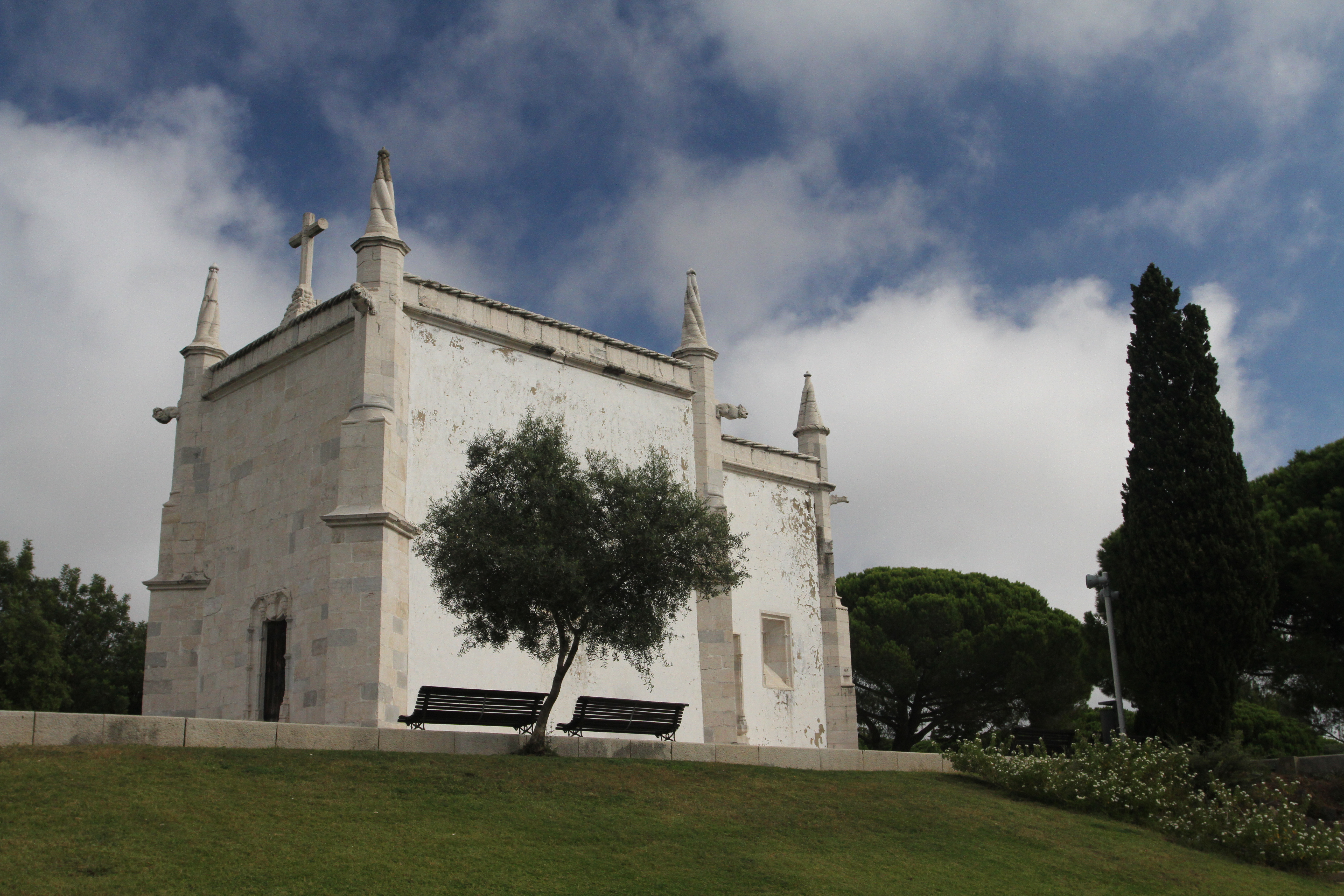 Chapelle St Jérôme à Restelo, Lisbonne, Portugal